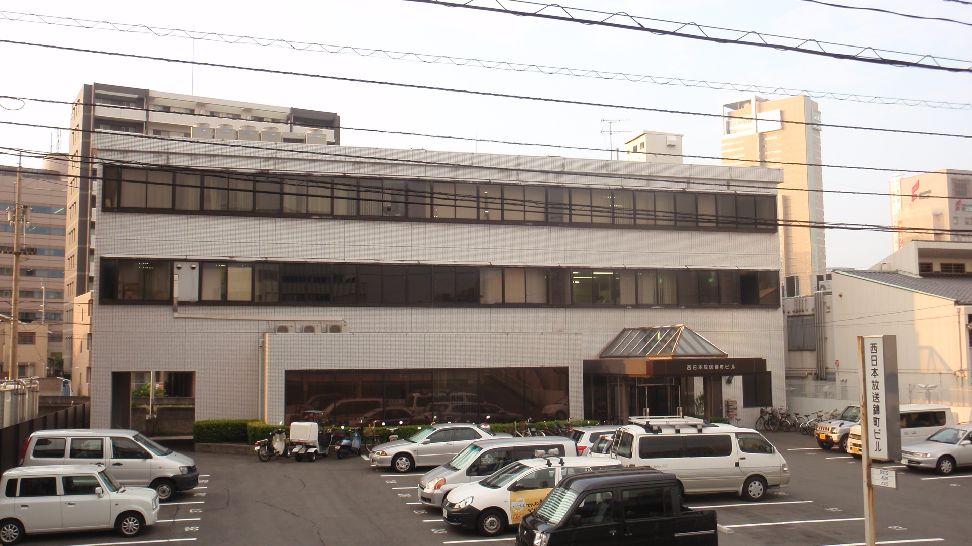 香川県高松市にある西日本放送錦町ビル。株式会社アール・シー・エスが入居する。